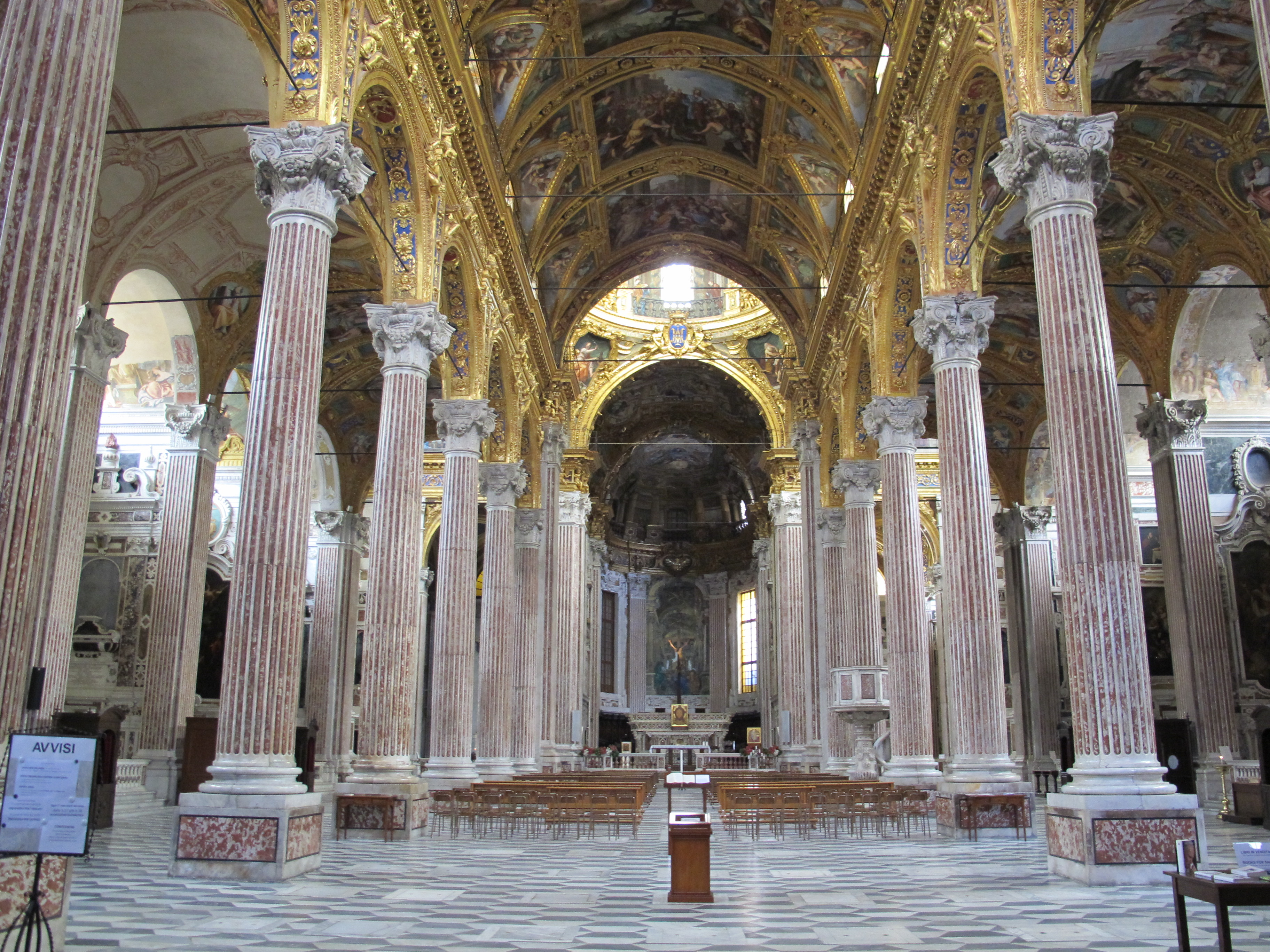 Genova, Liguria